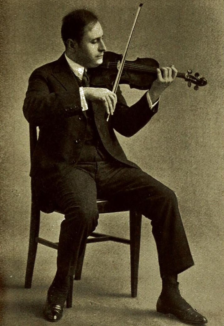 MAXIMILIAN PILZER CONCERTMASTER N. Y. PHILHARMONIC ORCHESTRA